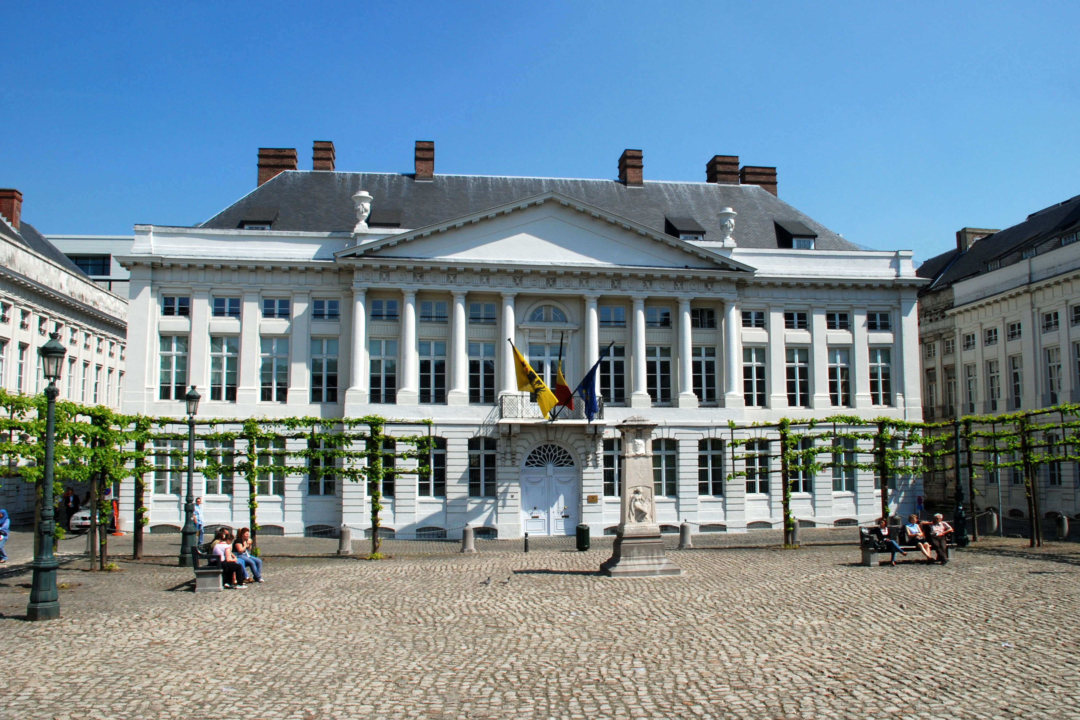 Belgique - Bruxelles - Place des Martyrs